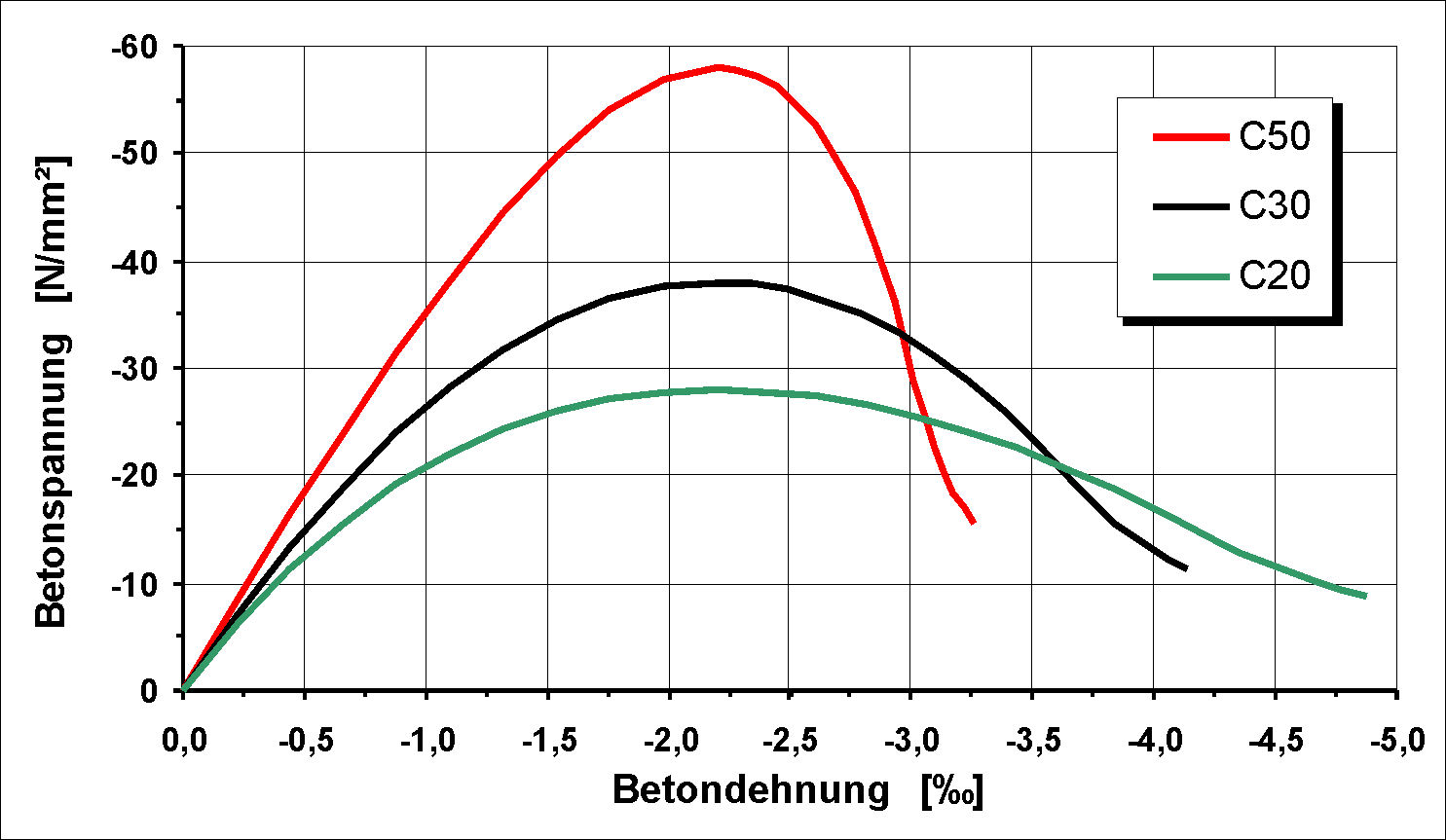 Spannungs-Dehnungsbeziehung von Beton